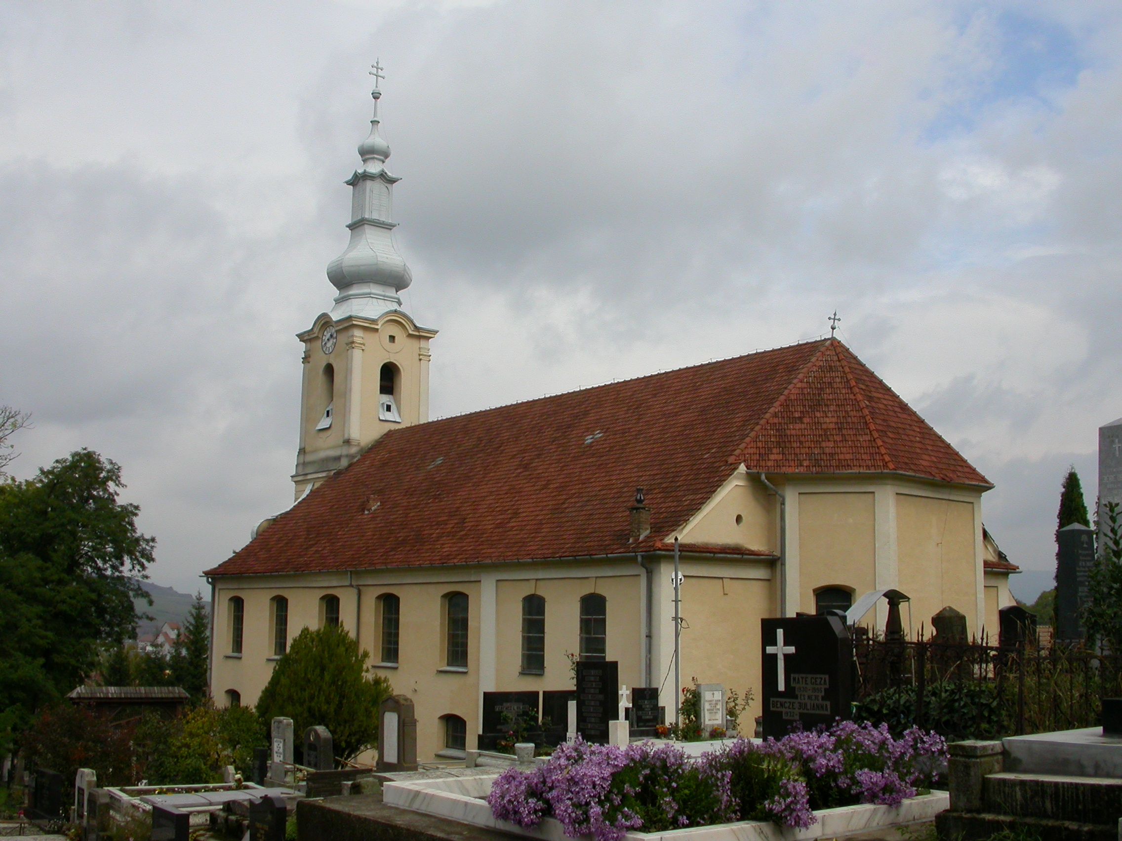 Ansamblul bisericii romano-catolice "Sf. Nicolae" sec. XVII - XVIII 01